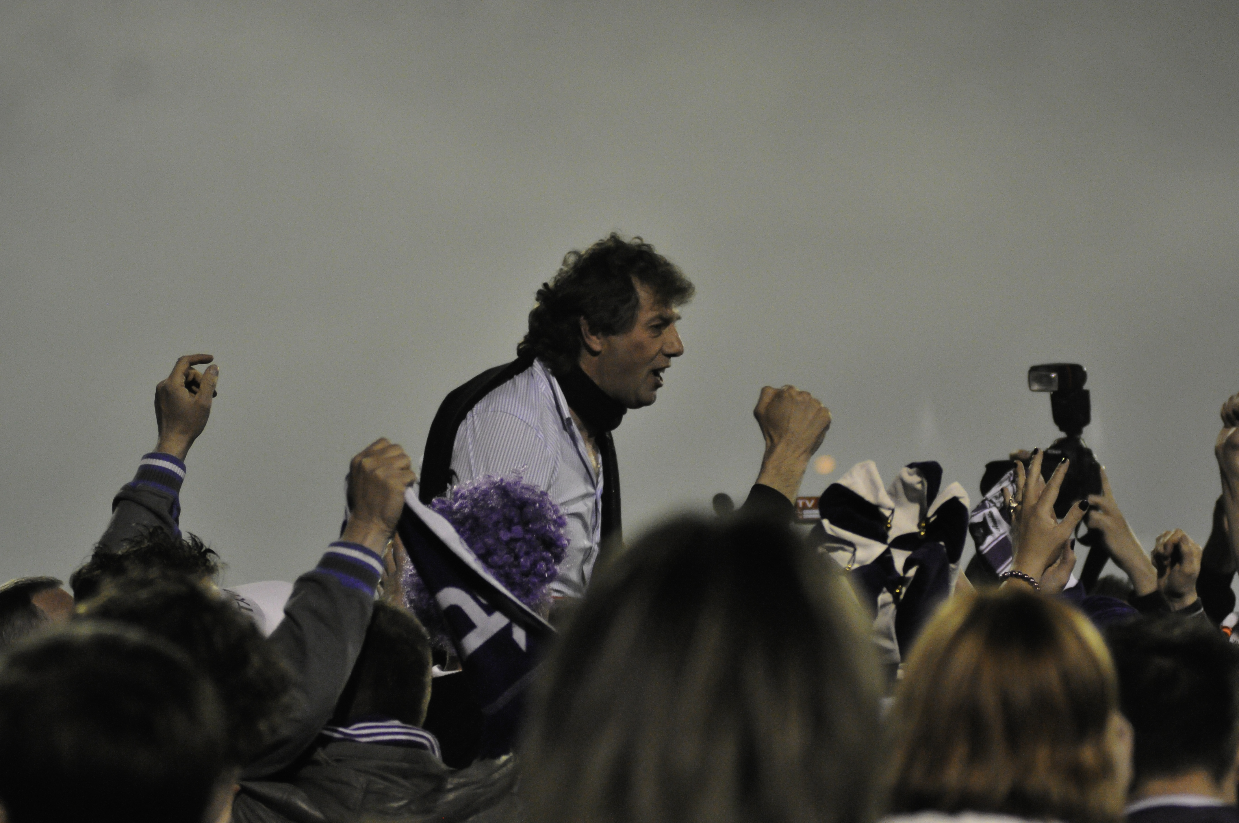 Norbert Beuls, oud-voetballer en anno 2010-011 trainer bij Patro Eisden Maasmechelen, hier bij het behalen van de titel op 10 april 2011